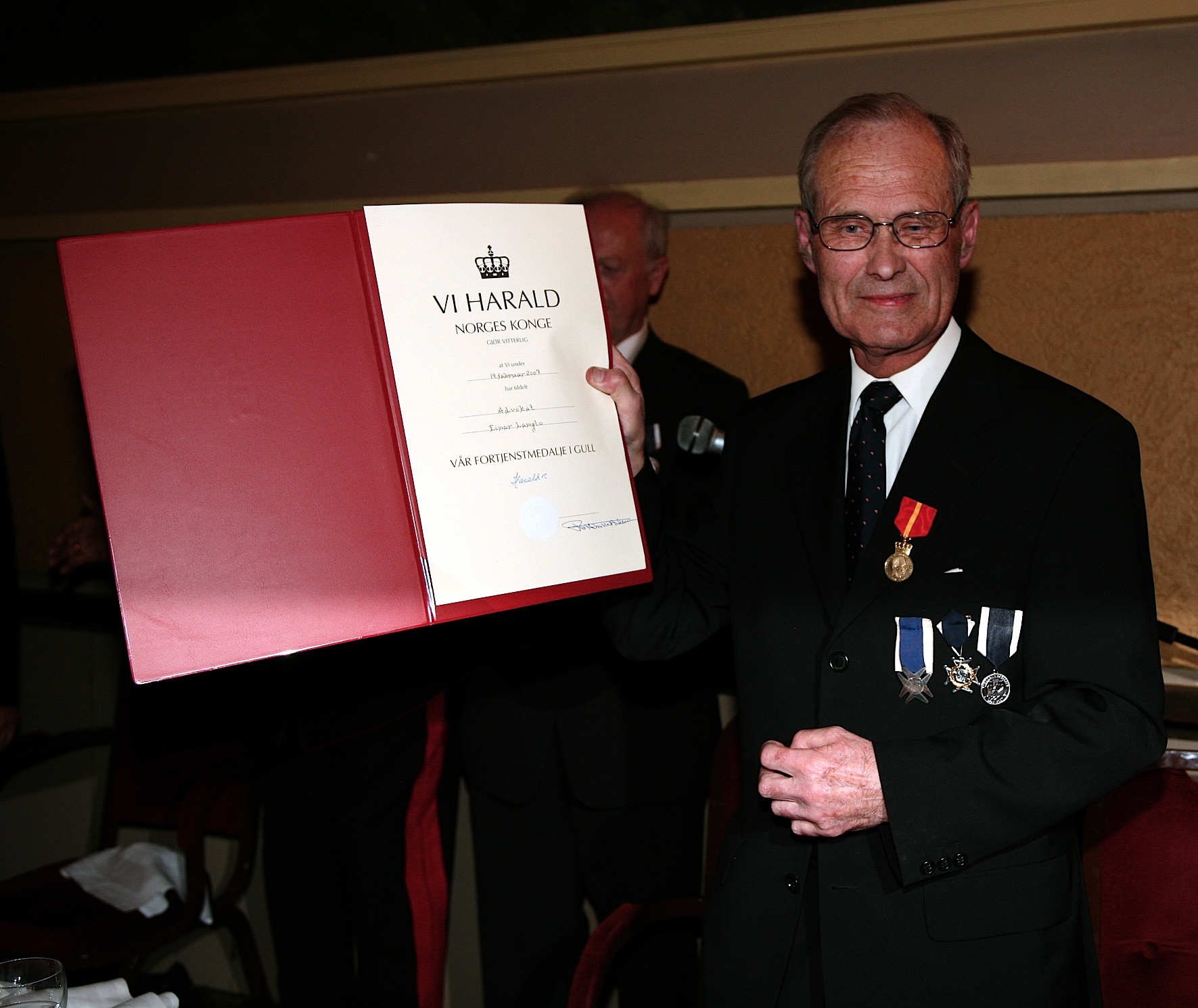 Einar Langlo med Kongens fortjenstmedalje i gull. Nygaards Bataljon 150 years Photo: Nina Aldin Thune from